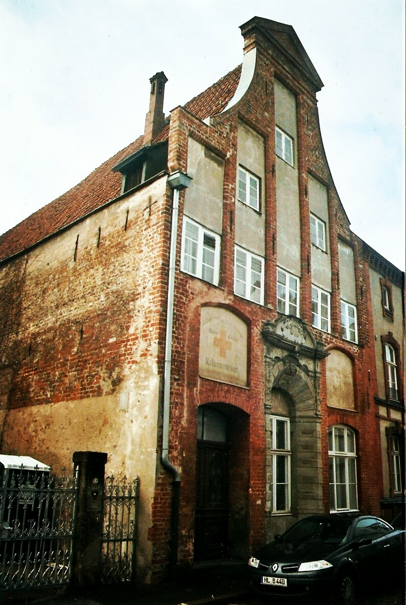 Einstiges Haus der Lübecker Sanitätskolonne, Schildstraße 10 in Lübeck